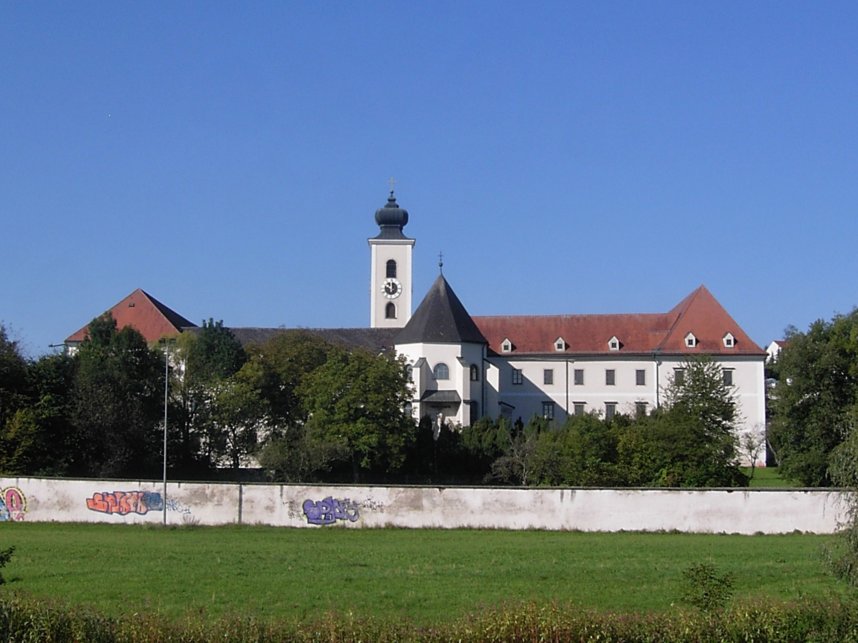 Steyr Gleinker Hauptstraße 20, Gesamtanlage ehemaliges Benediktinerstift samt Pfarrhof, Ostansicht des Klosters